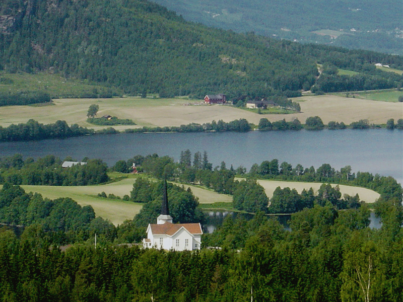 Fluberg kirke, in Søndre Land